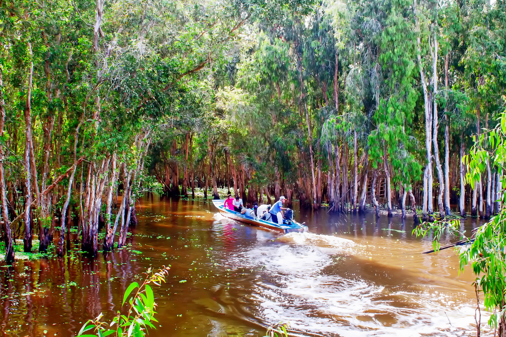 Một số du khách đang đi tham quan rừng tràm Trà Sư, thuộc xã Văn Giáo, huyện Tịnh Biên, An Giang, Việt Nam.